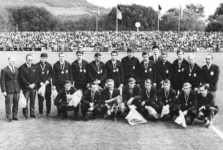 Zentralbild Liebers 25.5.70 FC Carl Zeiss ist Meister Der FC Carl Zeiss Jena wurde neuer deutscher Fußballmeister der DDR und stellte sich nach seinem letzten Heimspiel den Fotografen. Hintere Reihe v.l.: Fritz Zerrgiebel, Trainer, Herbert Kessler, Klubsekretär, Peter Ducke, Helmut Stein, Harald Irmscher, Werner Krauss, Michael Strempel, Hans Meyer, Gert Brunner, Dr. Dieter Zipfel, Trainer, Bernd Krauss, Dieter Scheitler, Jürgen Werner, Dr. Paul Dern, Trainer. Vordere Reihe v.l.: Wolfgang Blochwitz, Roland Ducke, Mannschaftskapitän, Georg Buschner, Cheftrainer, Haus-Ulrich Grapenthien, Udo Preusse, Peter Rock, Rainer Schlutter und Dr. Manfred Dressler.